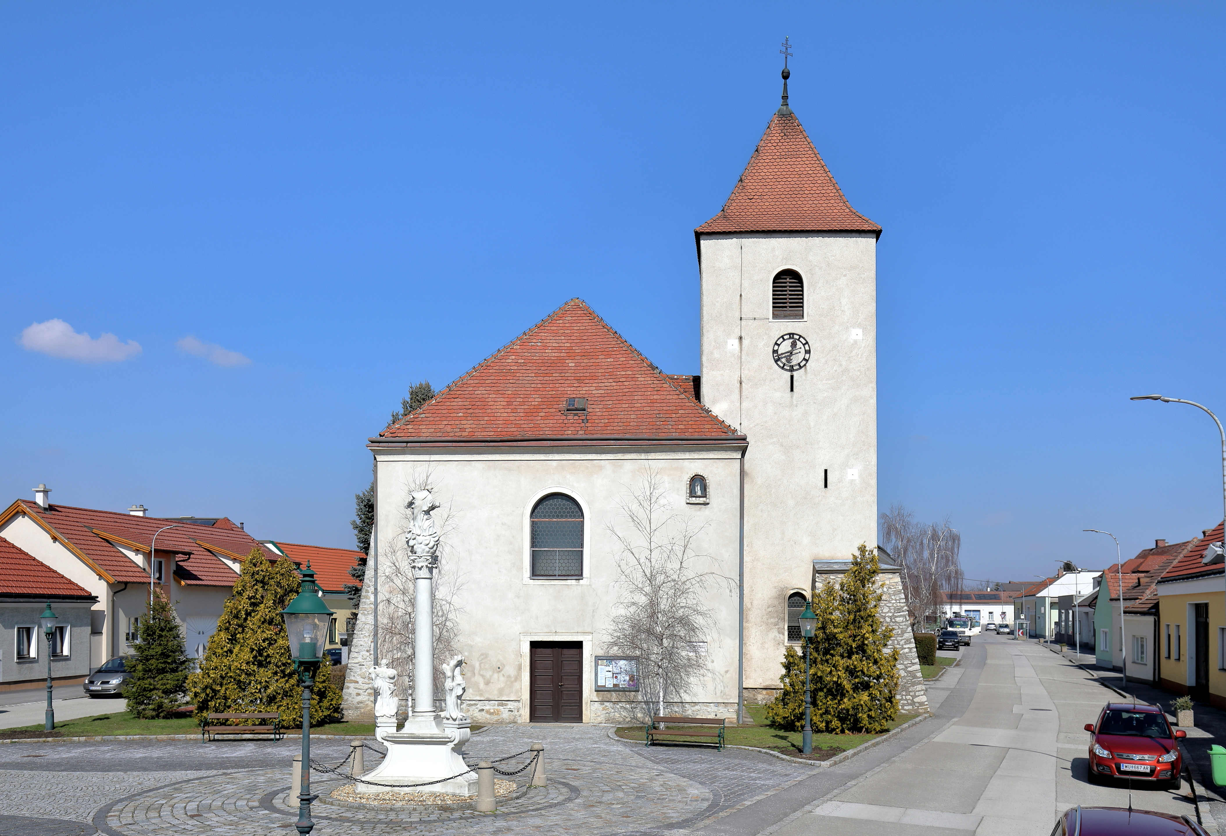 Das Ortszentrum der niederösterreichischen Gemeinde Rauchenwarth mit der röm.-kath. Pfarrkirche hl. Magdalena und einer Dreifaltigkeitssäule. Die Kirche wurde Ende des 17. Jahrhunderts errichtet, wobei der romanische Chorturm der Vorgängerkirche in den Neubau integriert wurde.